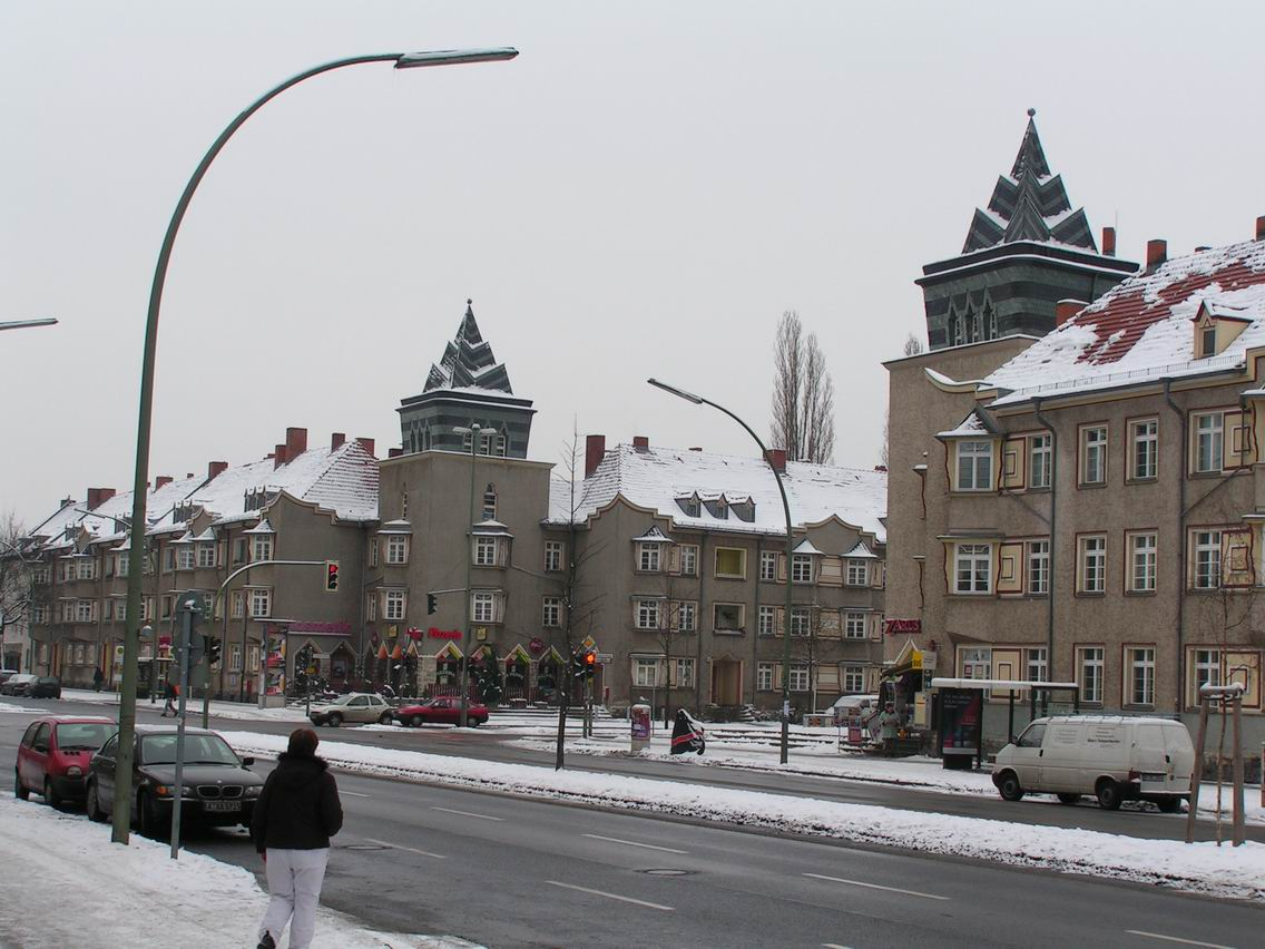 Berlin-Falkenhagener Feld - Ermisch-Häuser in der Falkenseer Chaussee/Zeppelinstraße